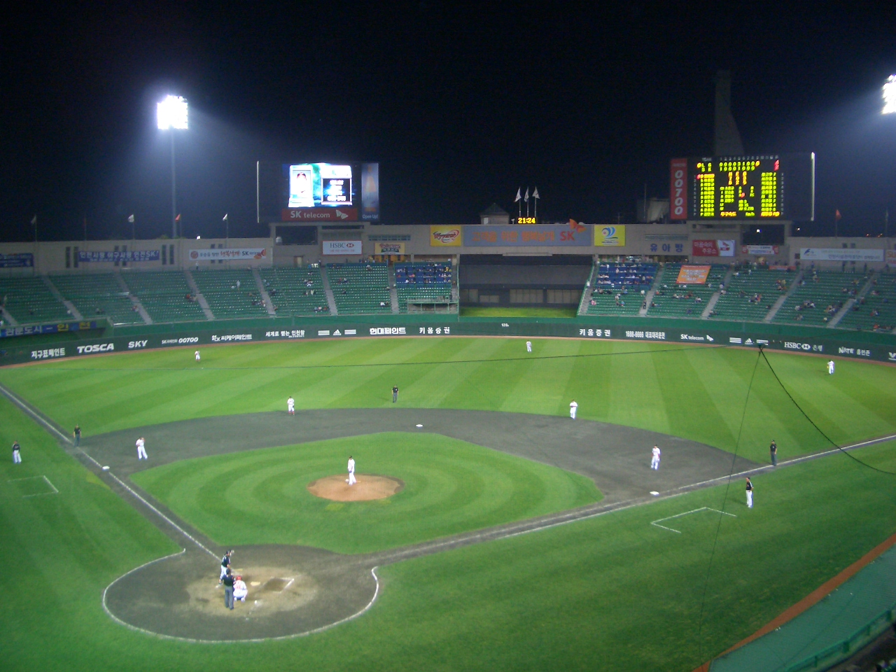 2006年6月13日 (火) 01:58 . . Whiz . . 1280×960 (625,384 バイト) (仁川・文鶴野球場の写真。)